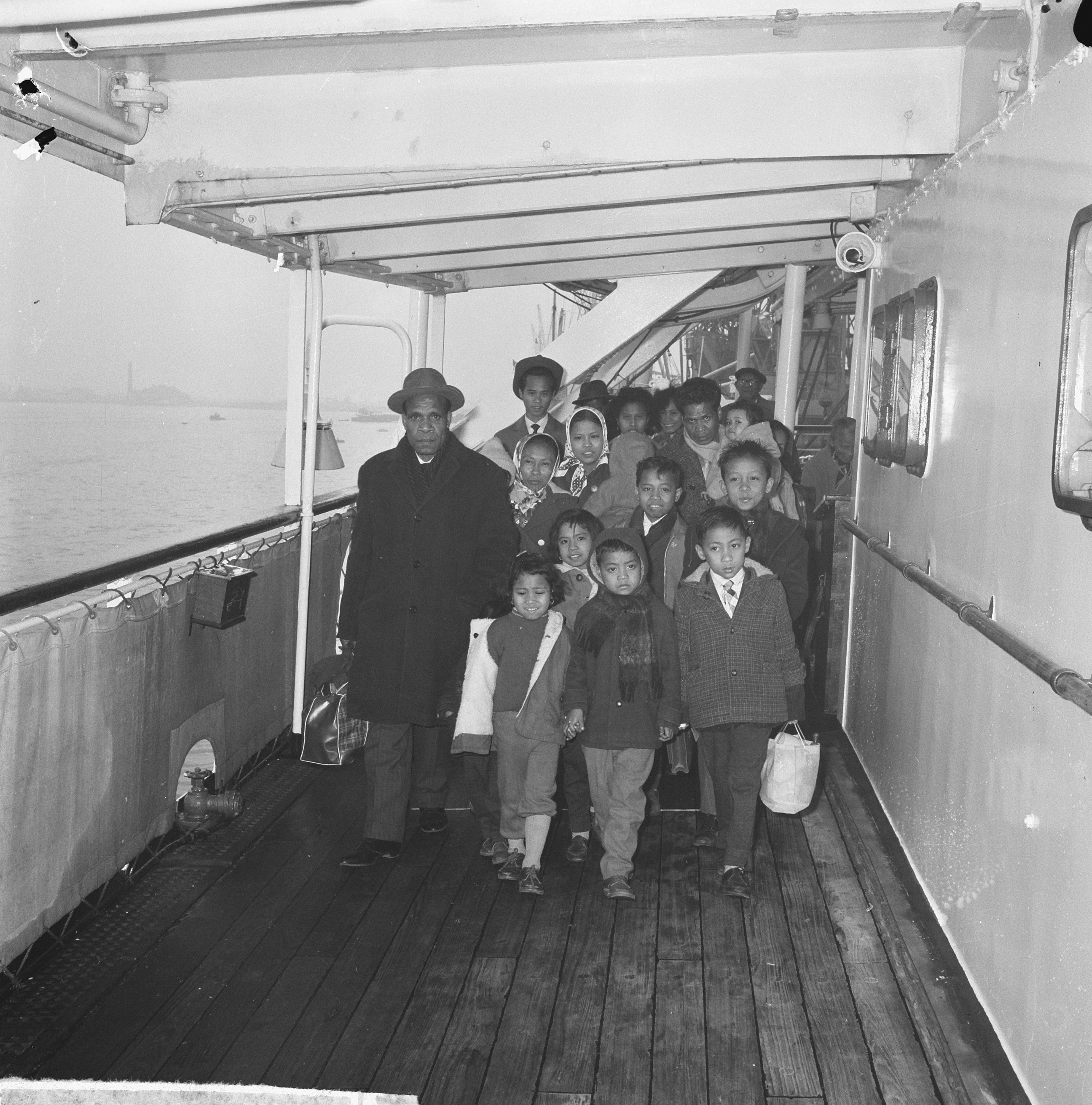 Collectie / Archief : Fotocollectie Anefo Reportage / Serie : [ onbekend ] Beschrijving : Toegoenezen met de Willemstad naar Suriname vertrokken, de groep Toeganezen aan boord op weg naar hun nieuwe vaderland Datum : 5 april 1963 Locatie : Suriname Trefwoorden : schepen Instellingsnaam : MS Willemstad Fotograaf : Nijs, Jac. de / Anefo Auteursrechthebbende : Nationaal Archief Materiaalsoort : Negatief (zwart/wit) Nummer archiefinventaris : bekijk toegang 2.24.01.03 Bestanddeelnummer : 915-0116